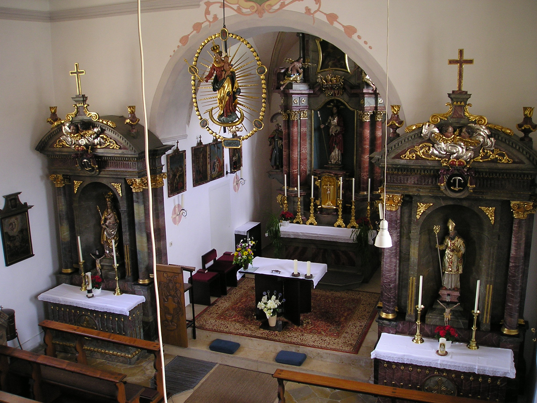 Pfünz_im_Landkreis_Eichstätt_St._Nikolaus_Innen.jpg